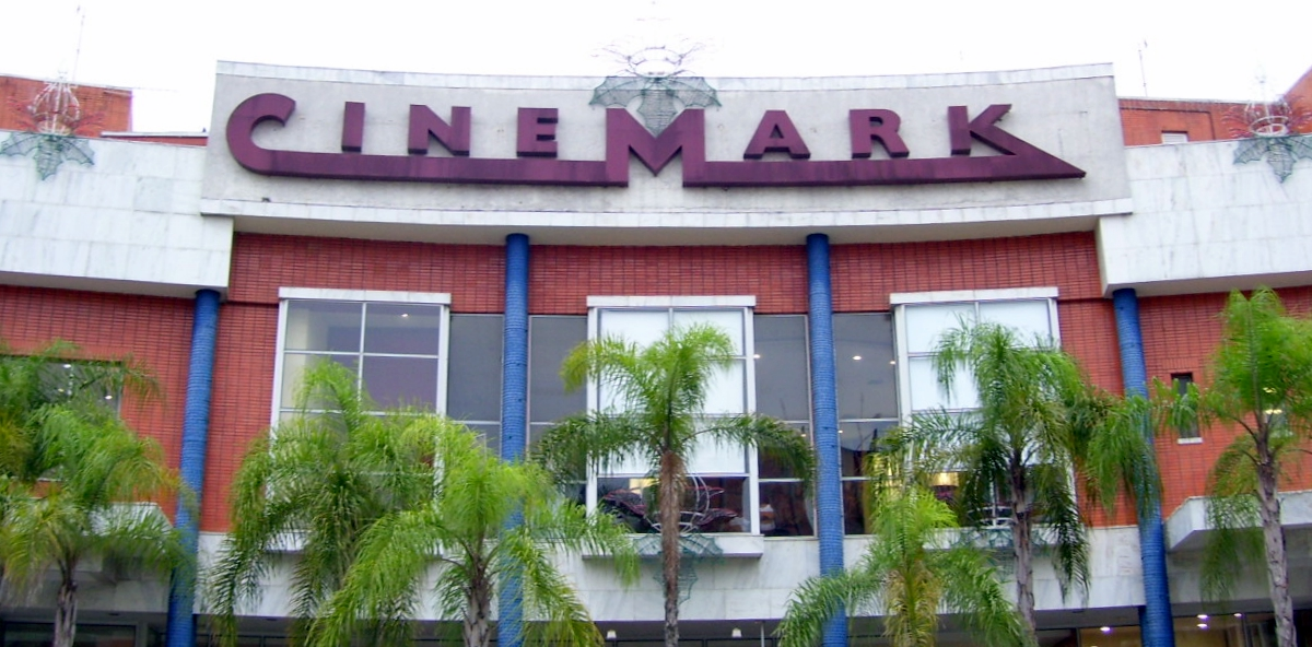 Letreiro do Cinemark no shopping Downtown, Rio de Janeiro, RJ, Brasil.